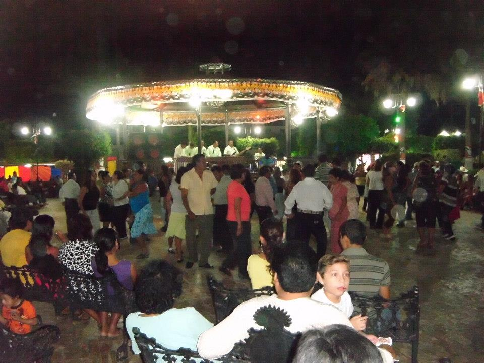 Cada domingo los habitantes de Villa Corzo gozan de una noche al ritmo de la marimba en el centro de la ciudad, toda una tradición.